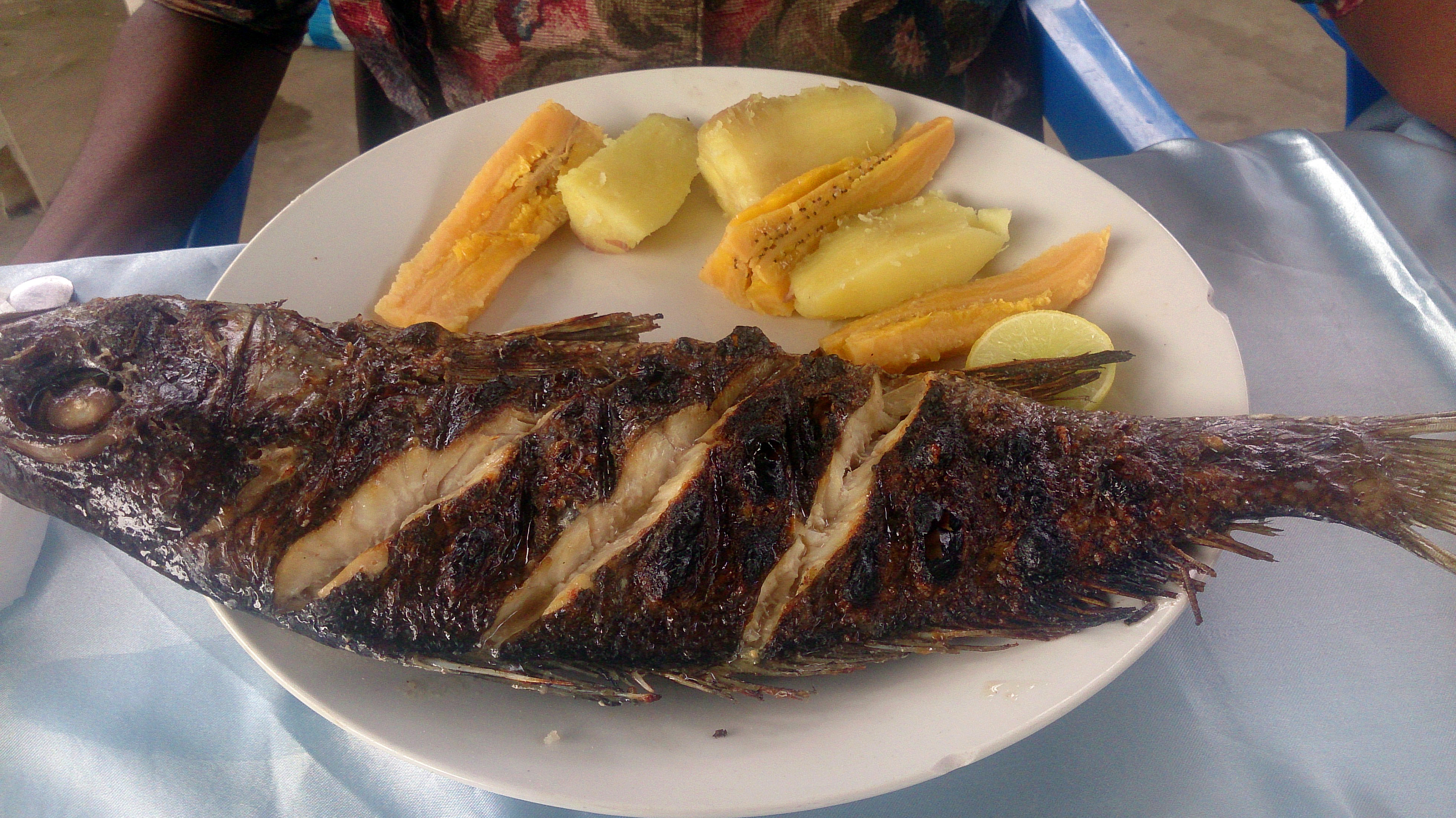 Peixe Calafate, acompanhado de batata doce e banana cozidas. Calafate Fish with sweet potato and banana, both boiled. This is an image of food from Angola